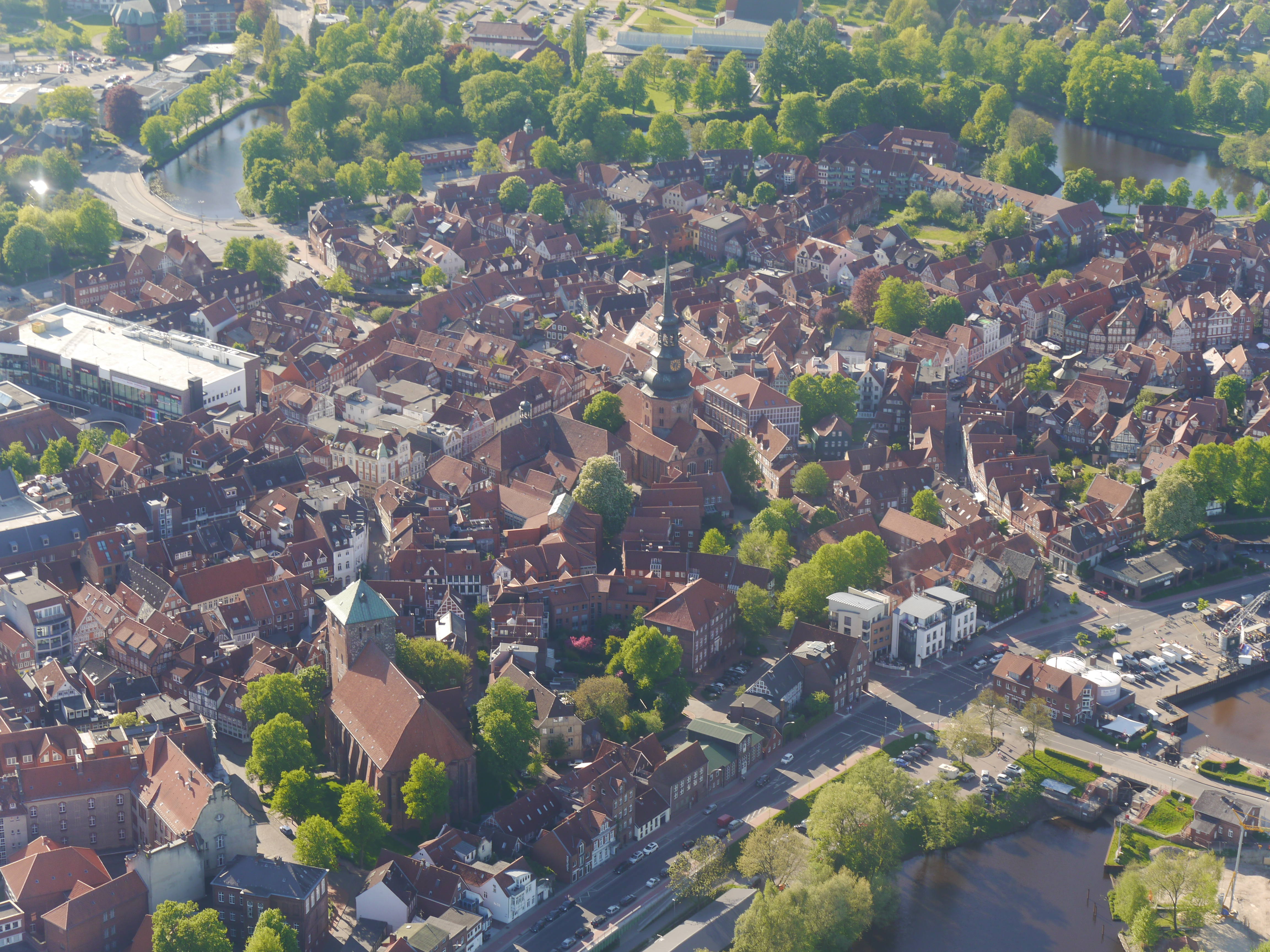 Stader Innenstadt Luftbild